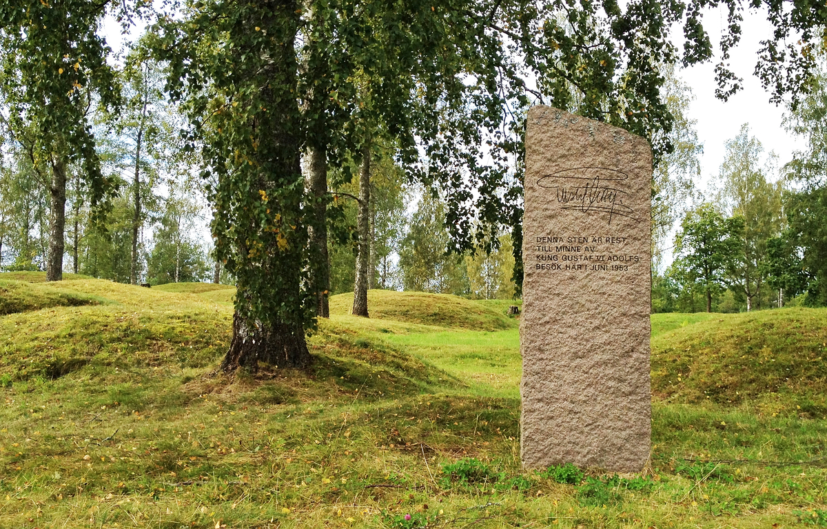 Värmlands största gravfält.